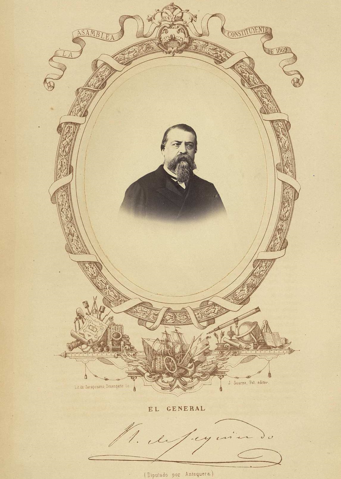 Retrato de Rafael Izquierdo y Gutiérrez. Fotografía de José Suárez en papel albúmina sobre orla litográfica de Zaragozano. Inscripción: "La Asamblea Constituyente de 1869 / El General / [facsímil del autógrafo] / (Diputado por Antequera)